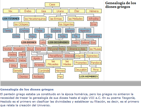 Cuadro sobre el Panteón Griego